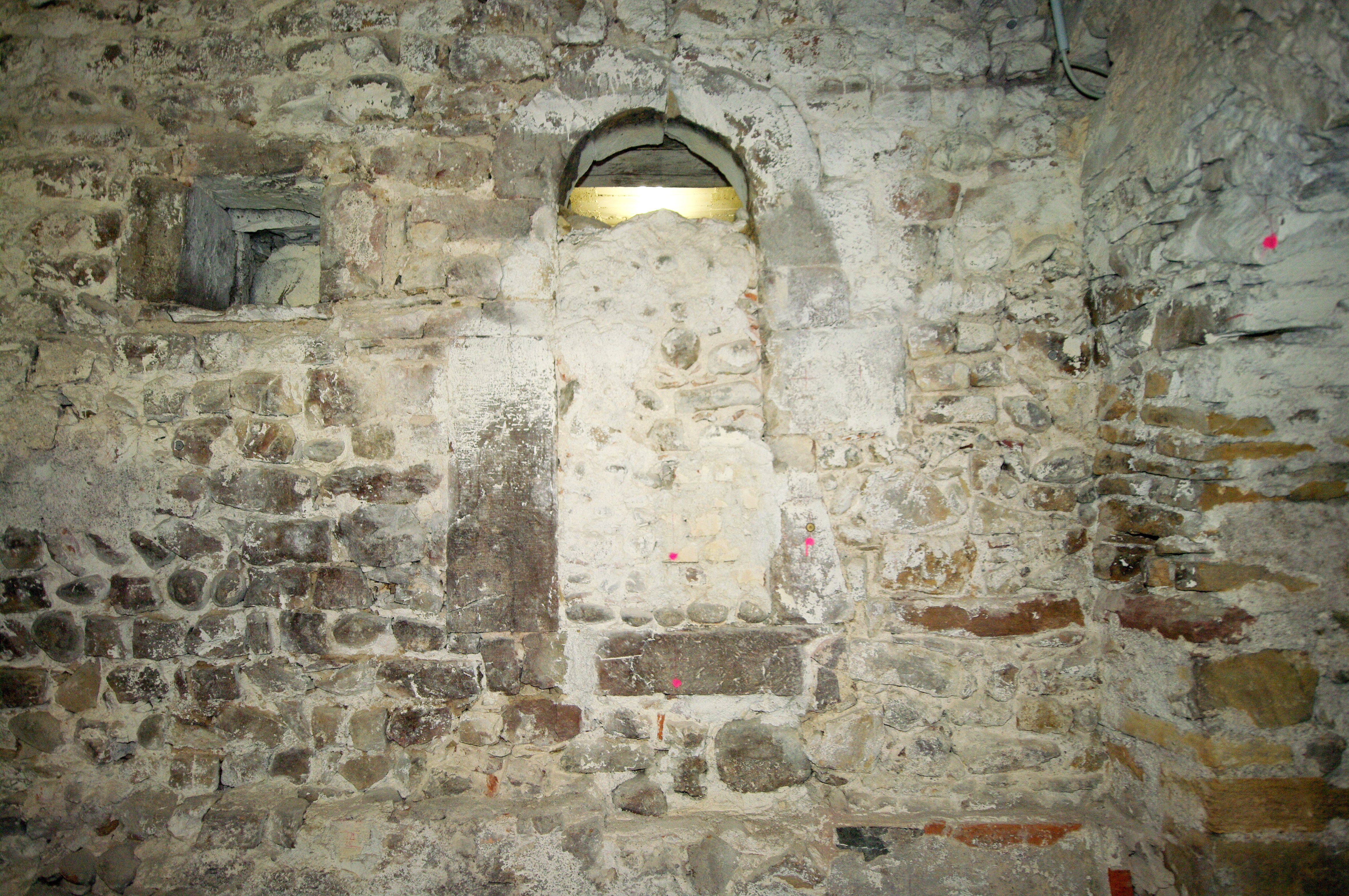 Eingangstür des vermutlich ältesten Hauses in Freiburg (1120) von außen, jetzt im Keller, da das Bodenniveau um 2-3m angehoben wurde.